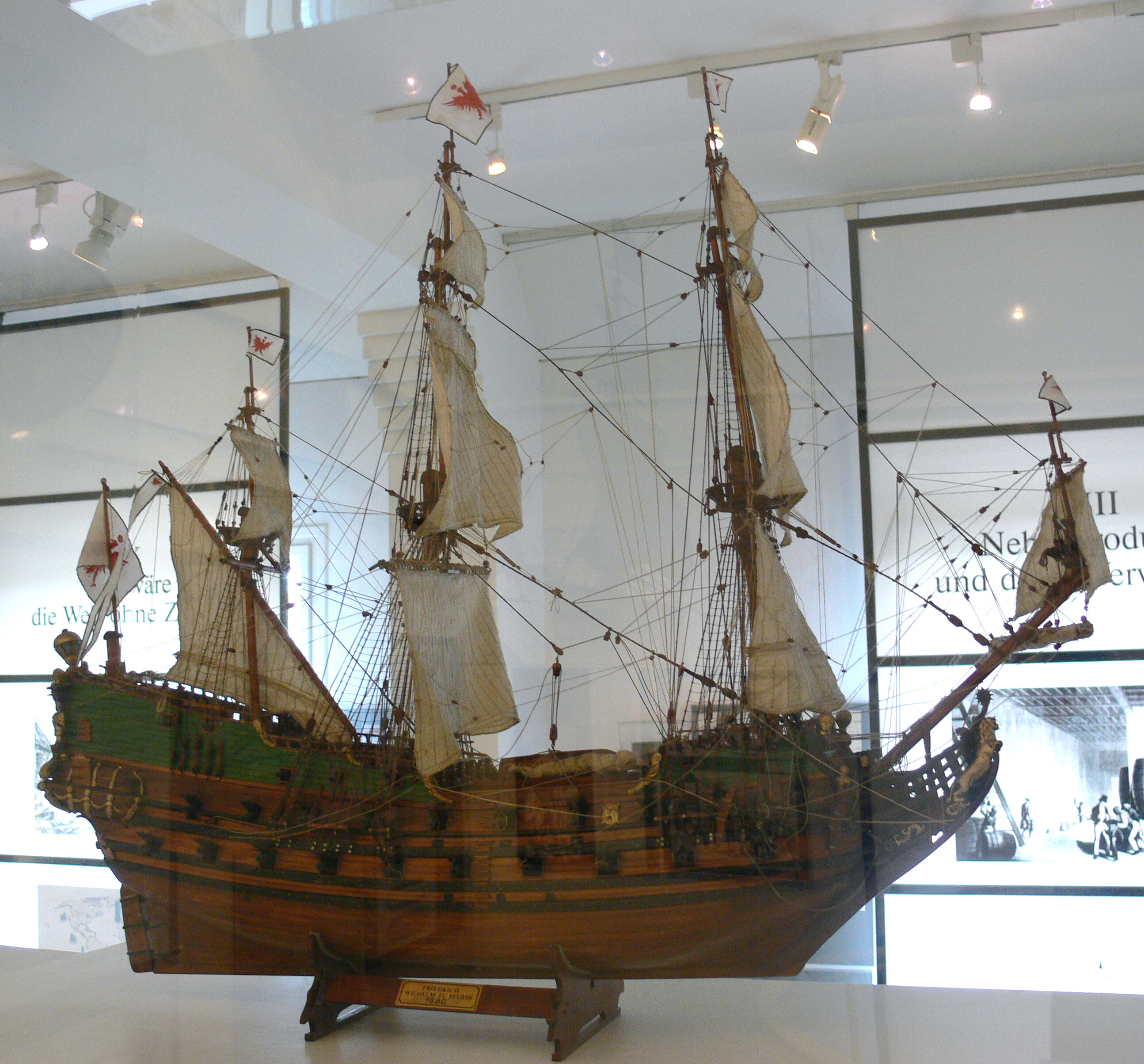 Modell des brandenburgischen Zweideckers „Friedrich Wilhelm zu Pferde“ (um 1680); Zucker-Museum Berlin